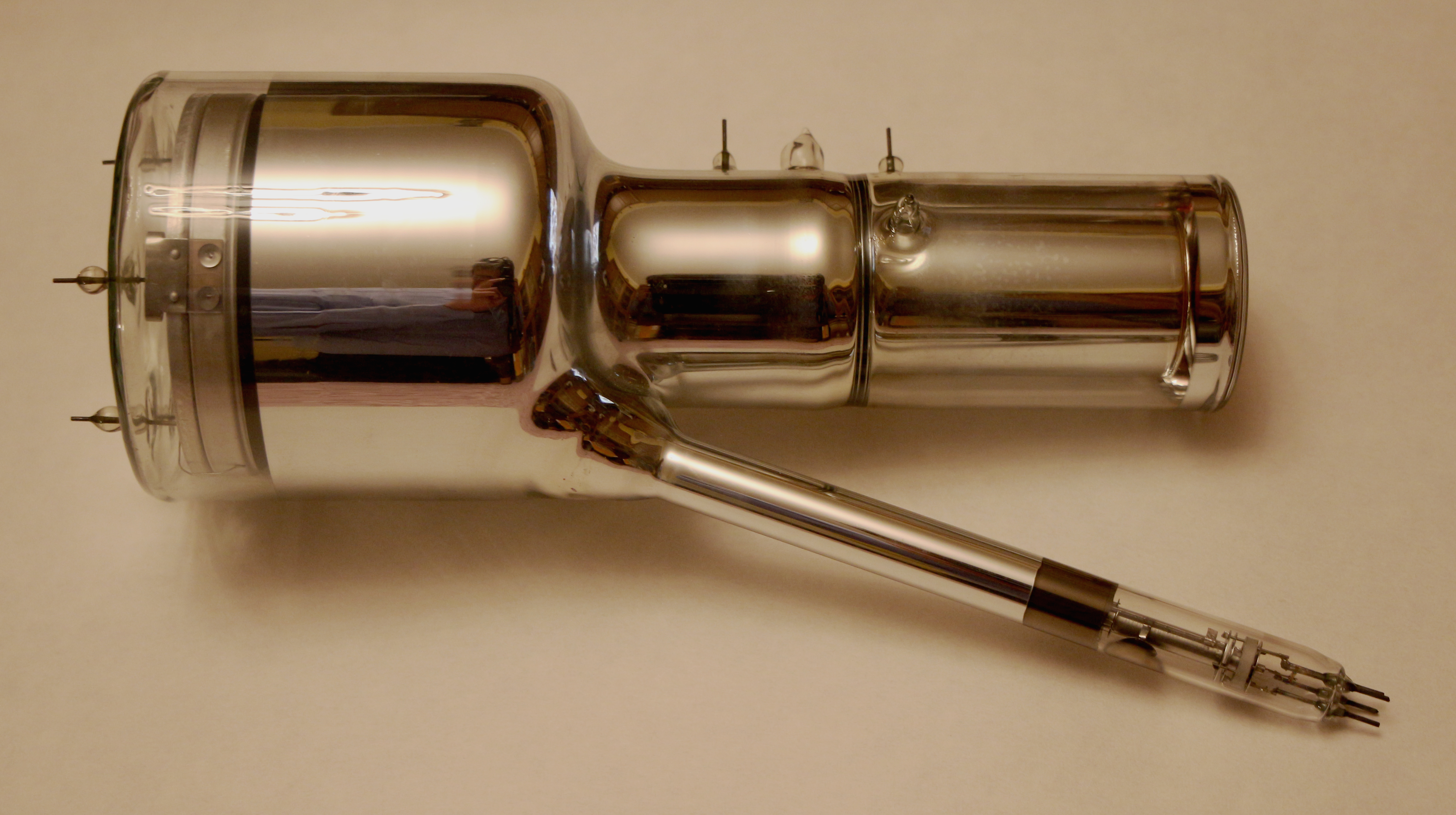 Super-Ikonoskop